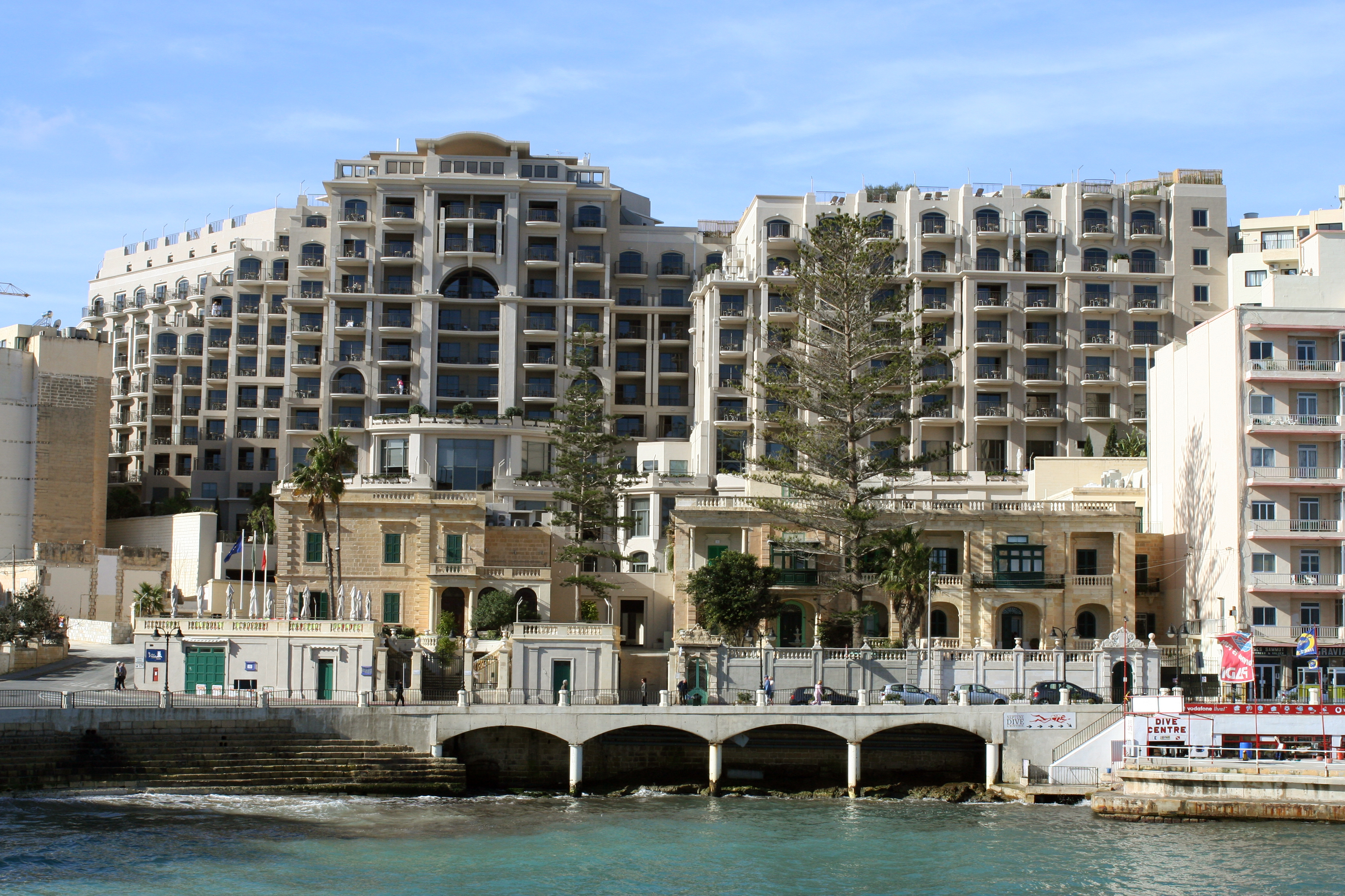 Malta, St. Julian's, hotels